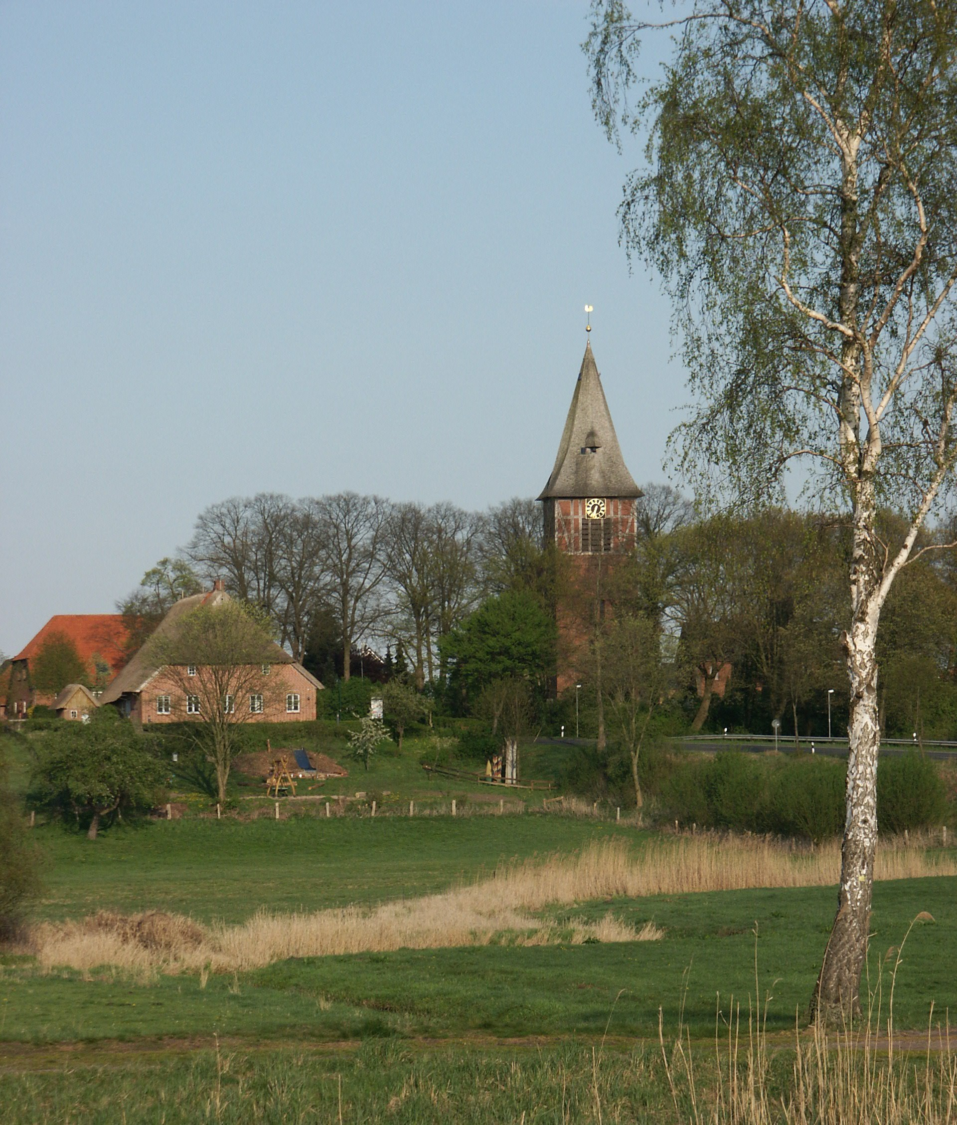 Büchen-Dorf mit Marienkirche und Priesterkate; im Vordergrund die Delvenau-Niederung